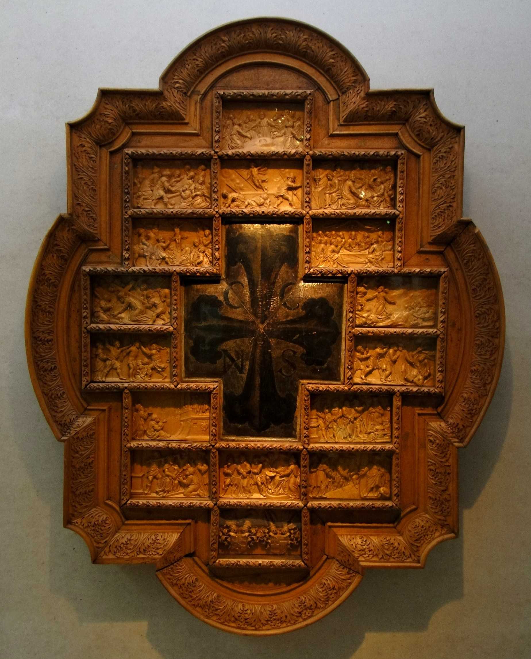 Das Epitaph Teuffel aus der Sophienkirche in Dresden, heute Stadtmuseum Dresden; Fotografie mit Fotoerlaubnis